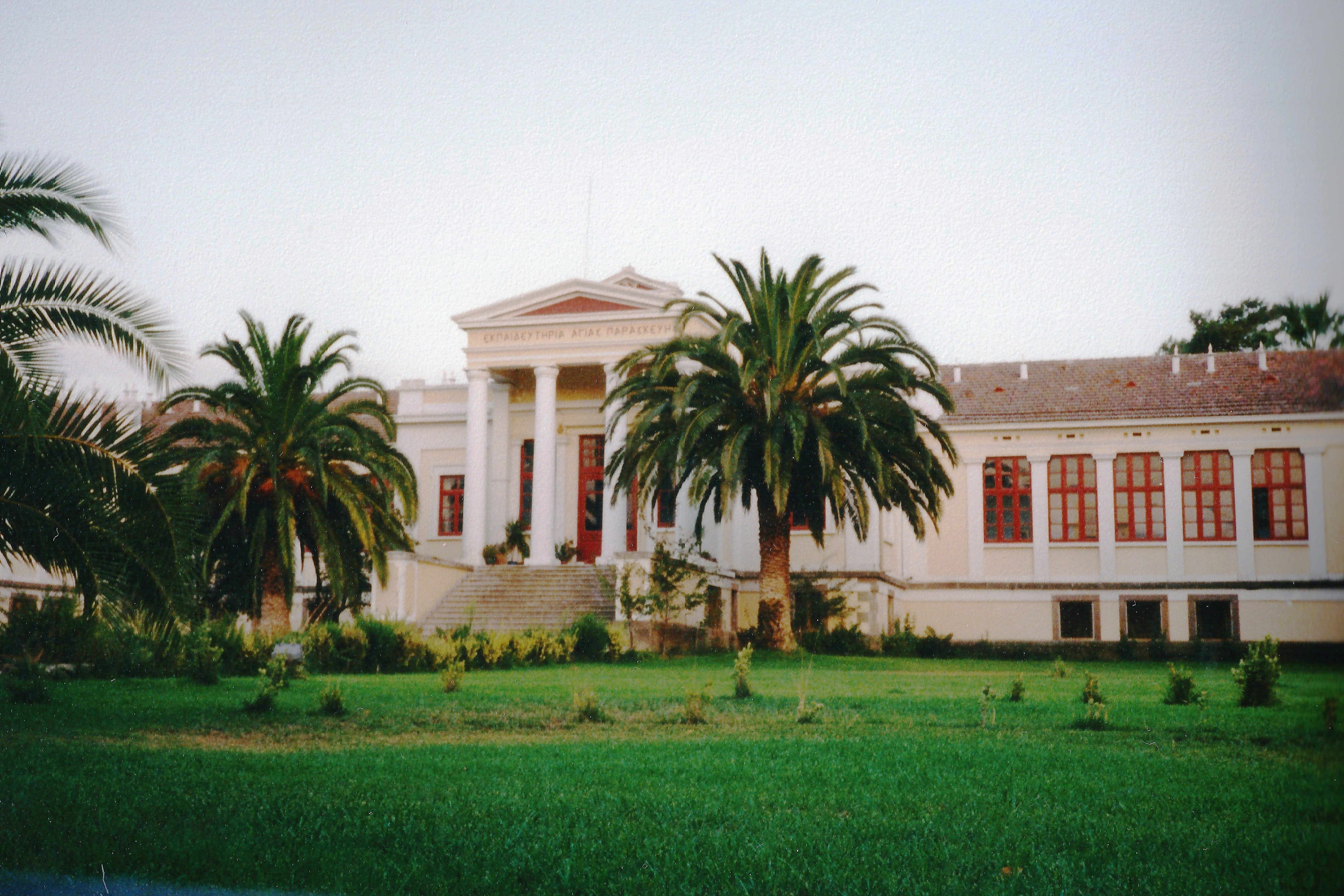 Σχολείο Αγίας Παρασκευής«Σχολείο Αγίας Παρασκευής»